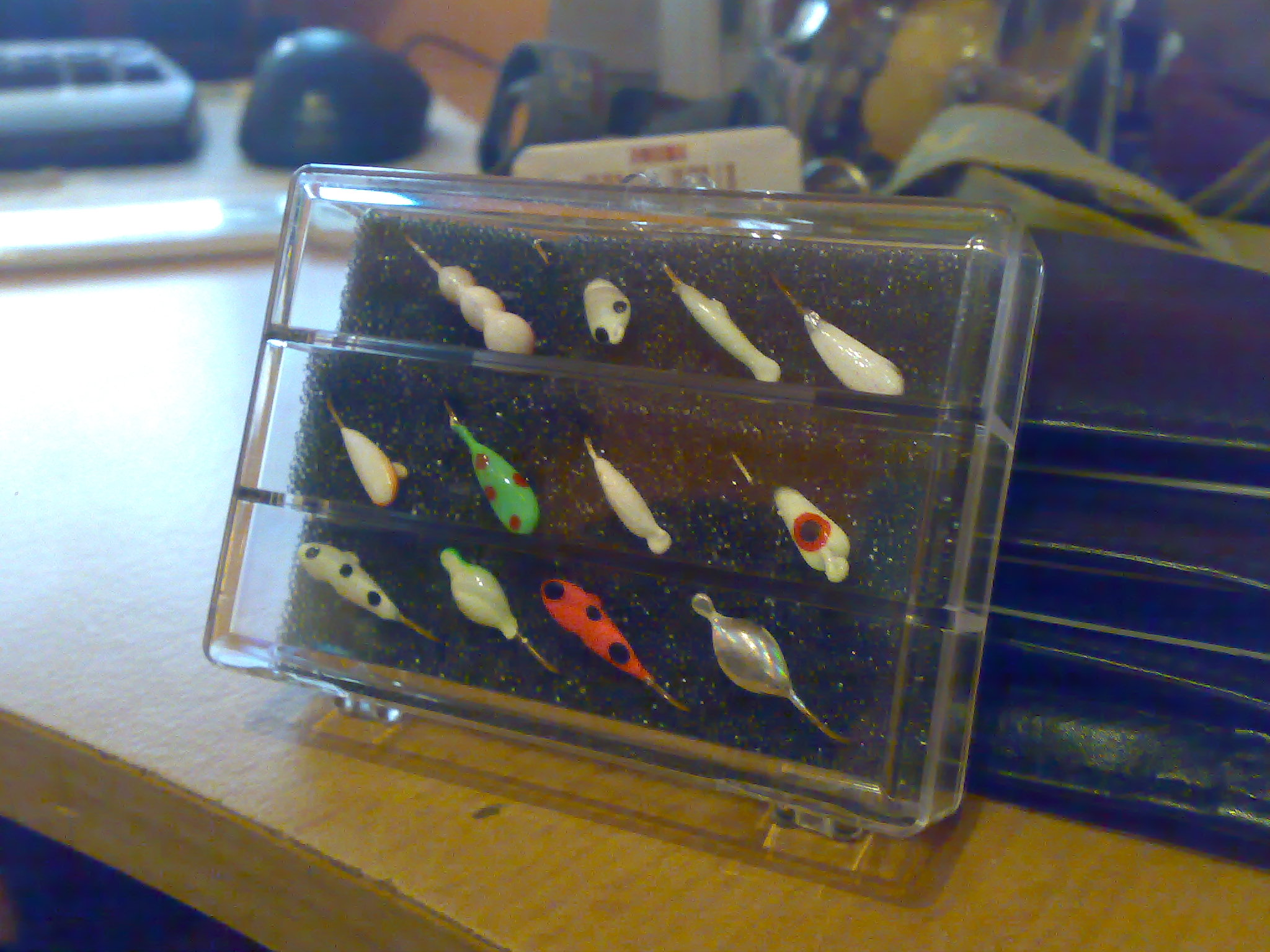 Das Bild zeigt einige sog. Mormyschkas die zum Eisangeln verwendet werden